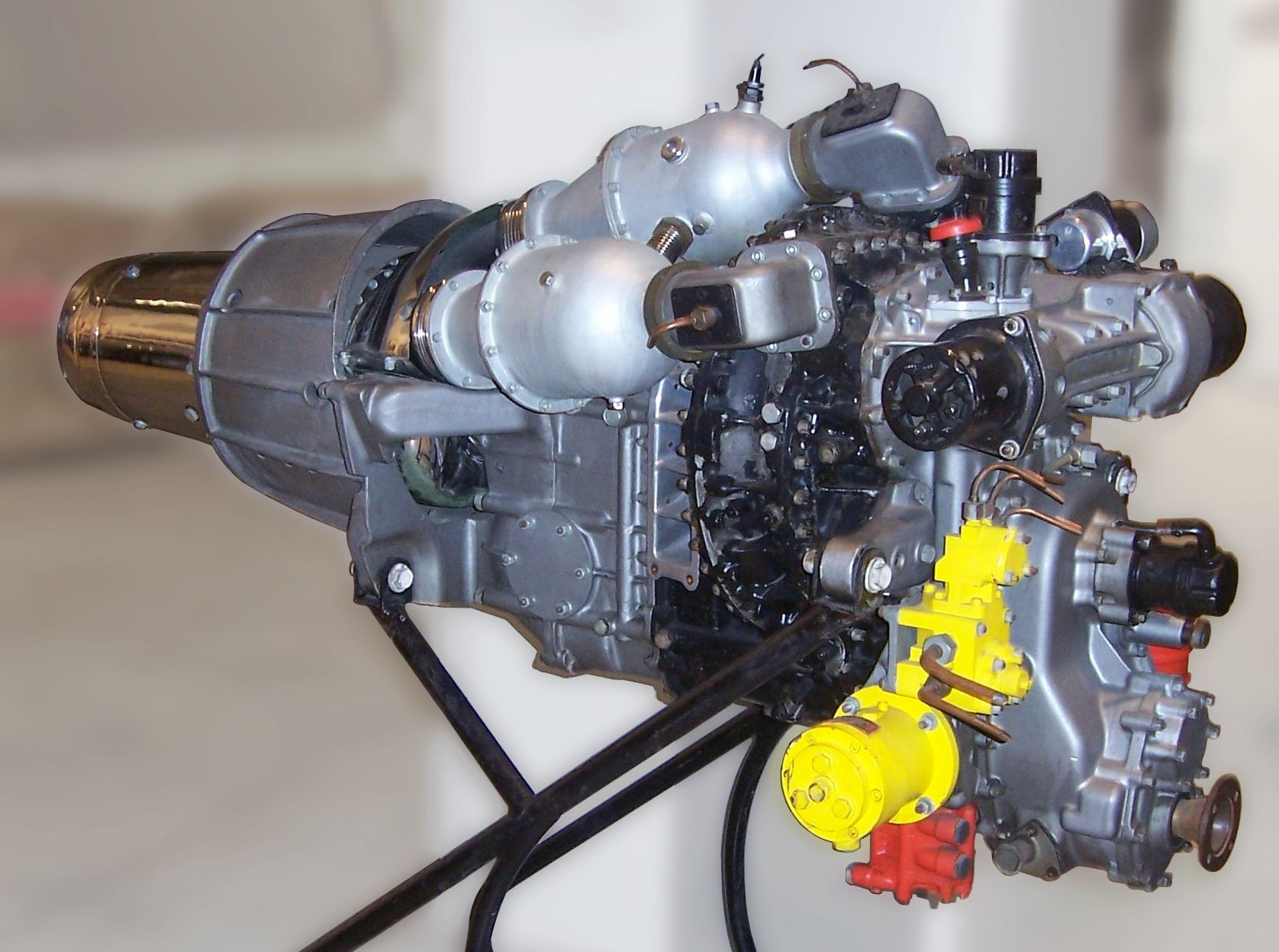 Gasturbine "Tipo 8001" der Fiat Turbina